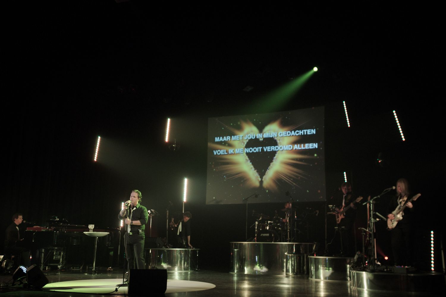 de Munk muzikale biografie theatertournee Foto: Roosfotografie